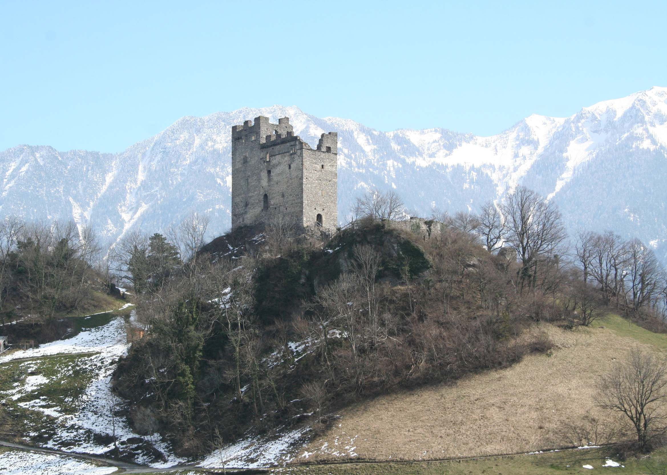 Ruine Wartau